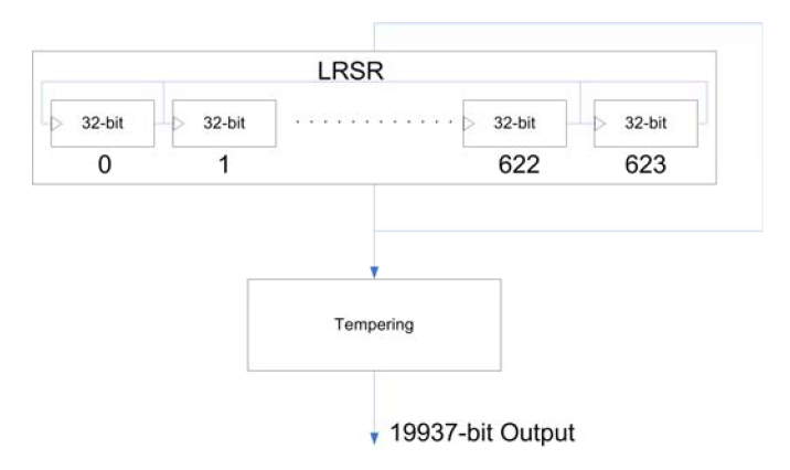 Блок схема для алгоритма генератора «Вихрь Мерсенна»